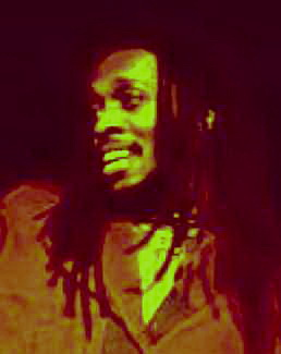 Ini Kamoze, jamaican reggae and dancehall artist